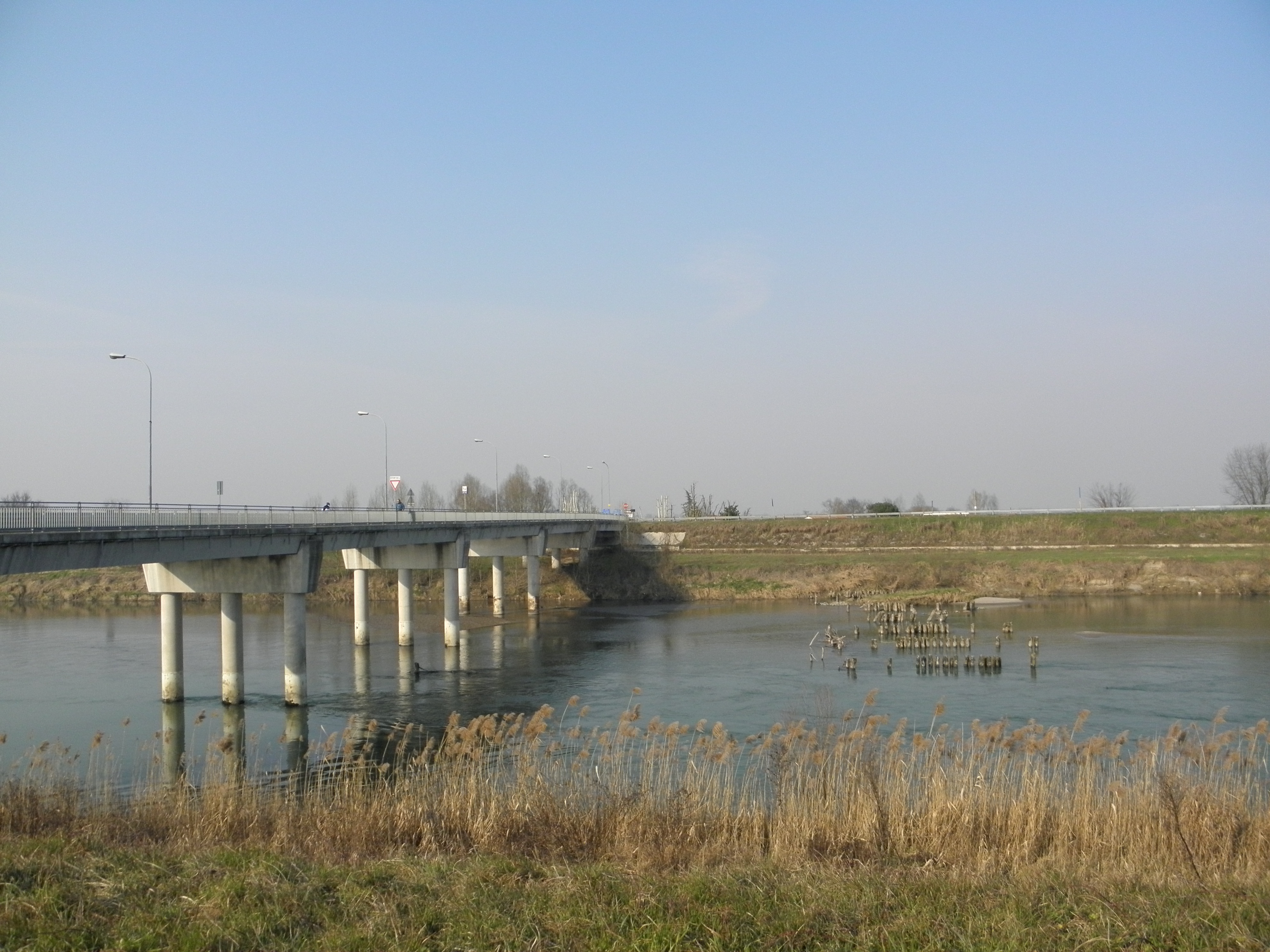 Lusia: il ponte sull'Adige ed i resti del vecchio ponte sulla destra.